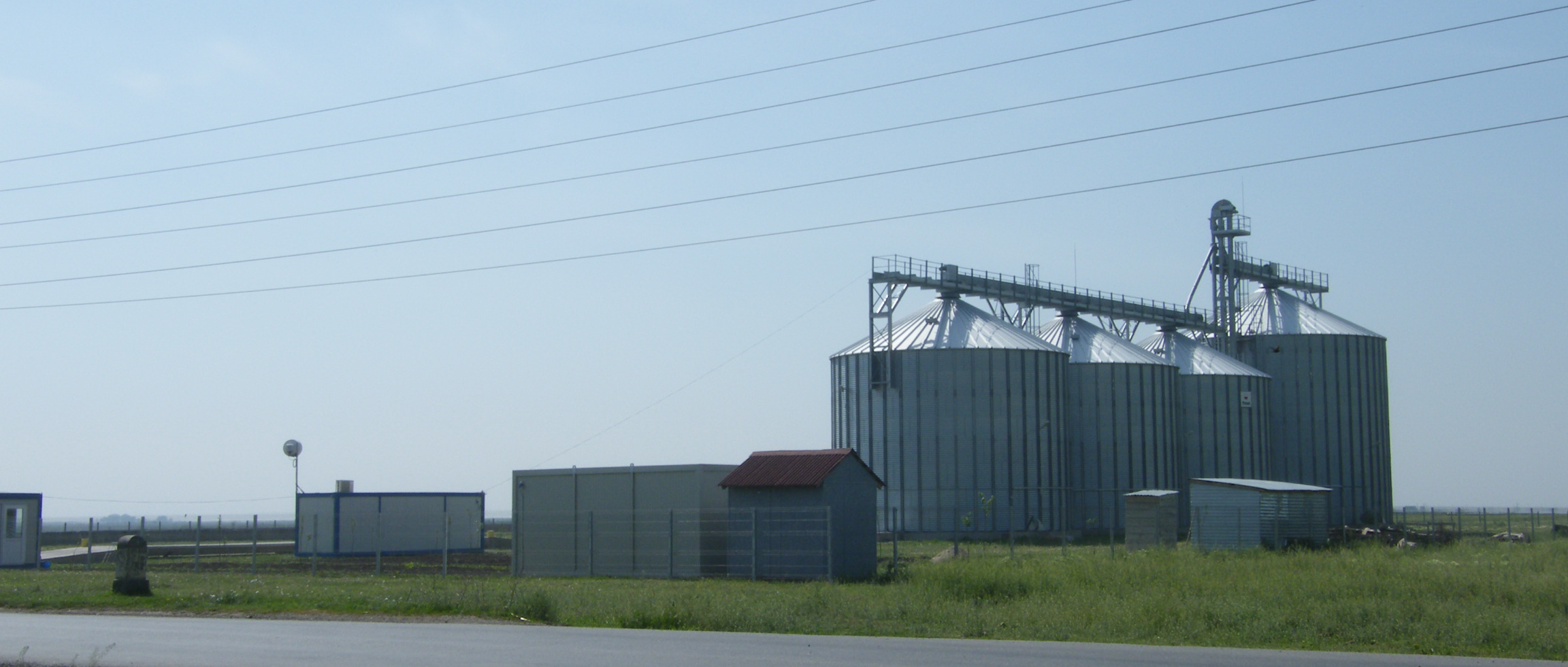 Siloz de cereale - iesire sud-est Bordei Verde Restricţii - fără restricţii